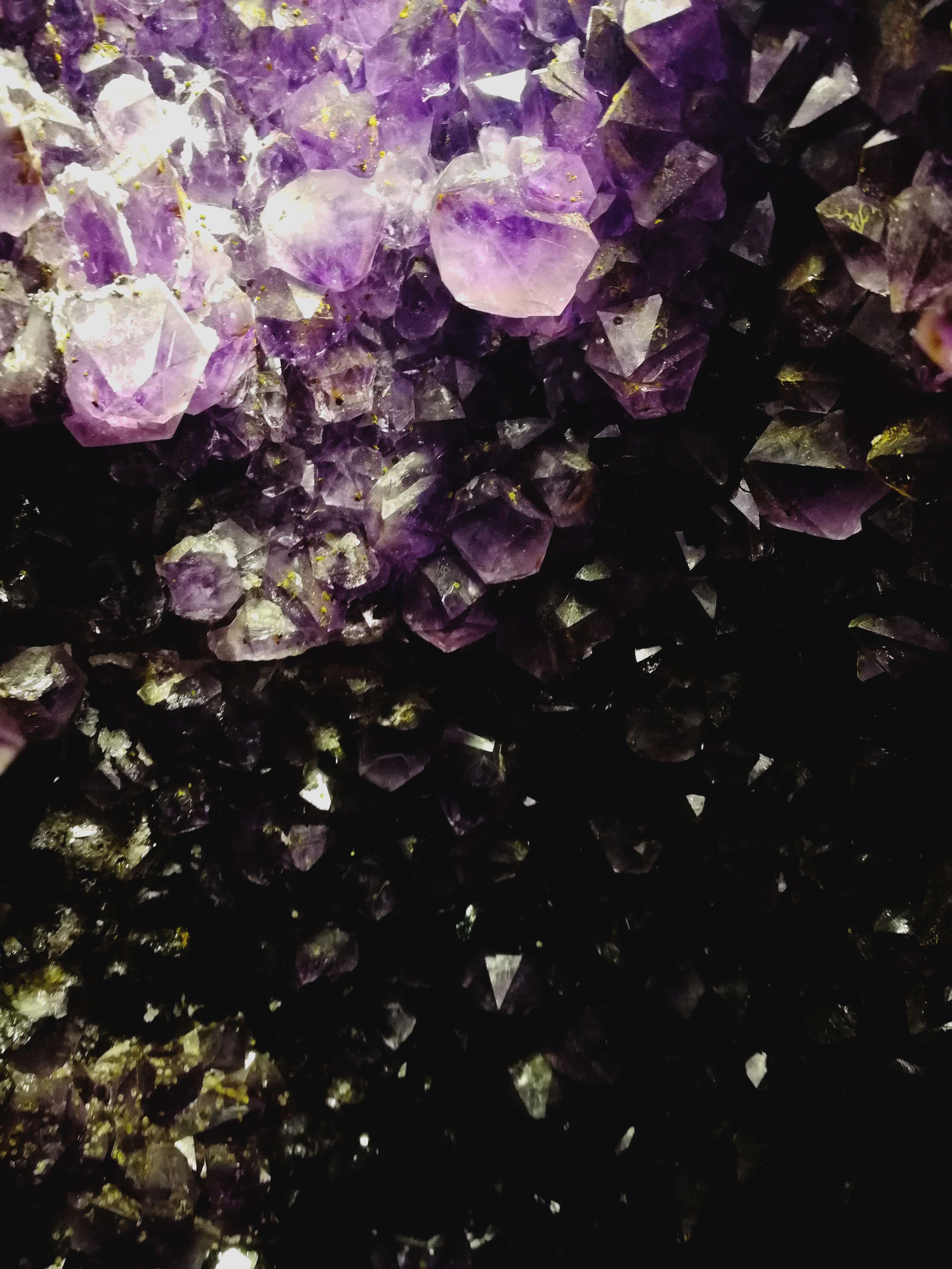 Mina de piedra amatista en el municipio de Ametista do Sul, Rio Grande do Sul, Brasil.